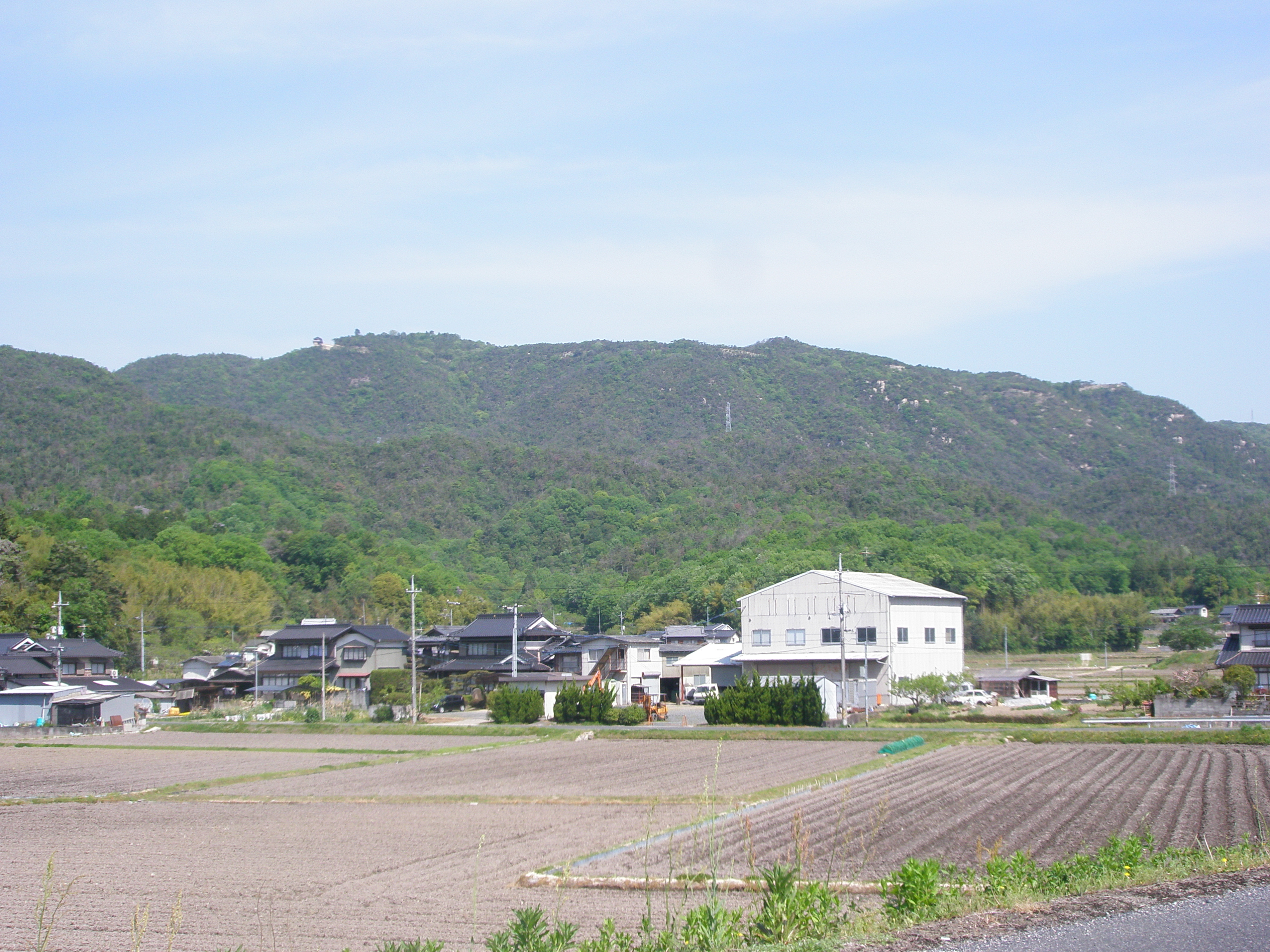 鬼ノ城を望む（水城状遺構より）